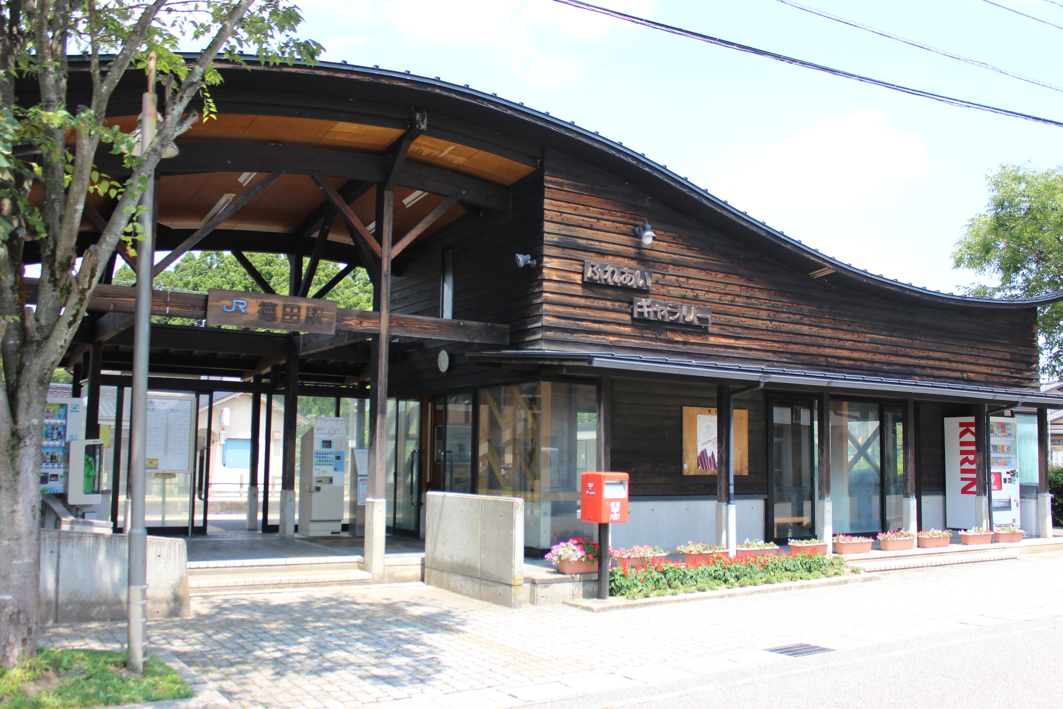 徳田駅（石川県七尾市） Canon EOS Kiss X5